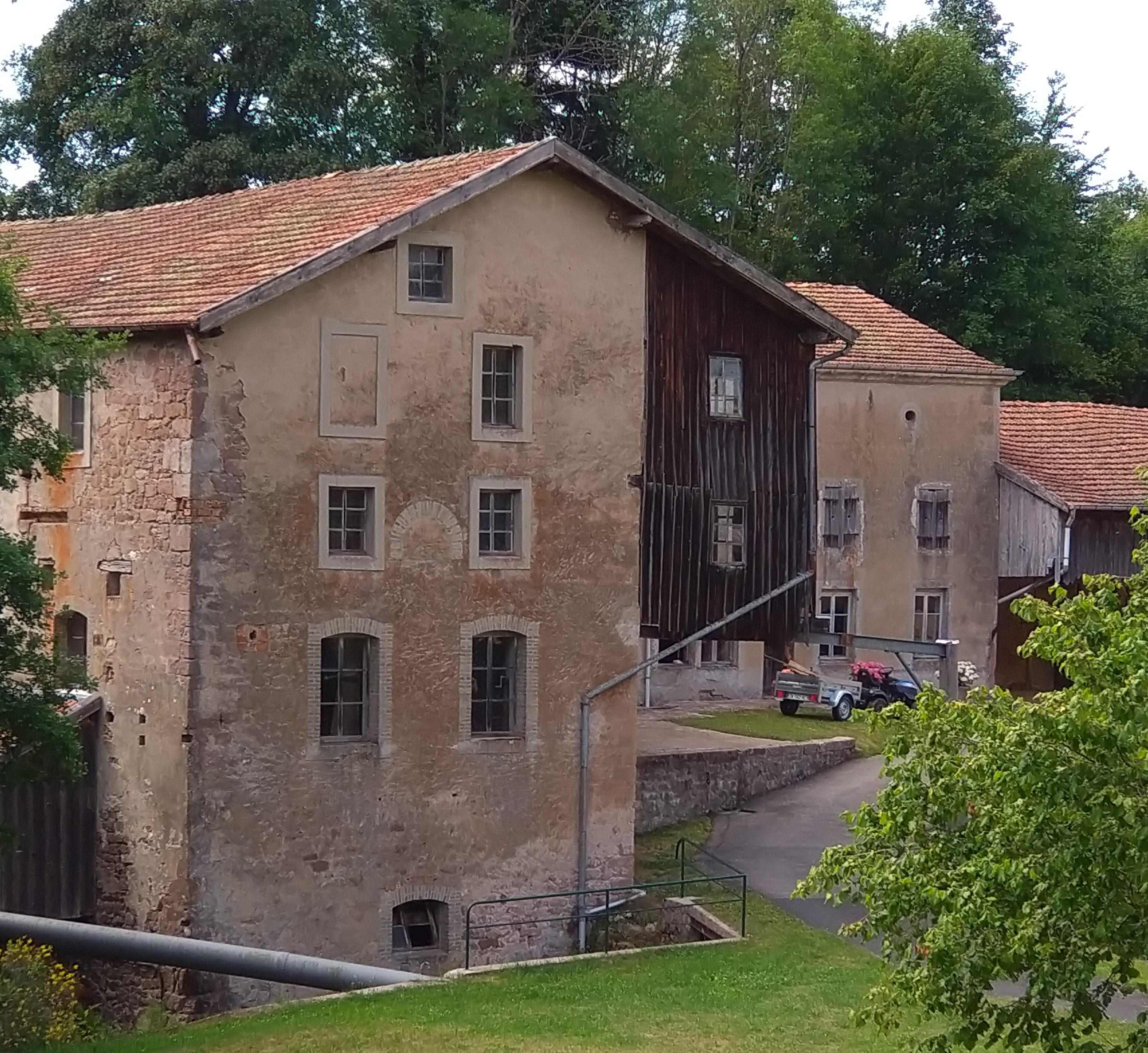 Xamontarupt (88) Moulin Saboterie du 19ème siècle